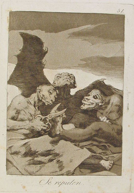 Capricho nº 51: Se repulen de Goya, serie Los Caprichos